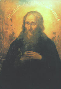 Преподобный Павел Послушливый